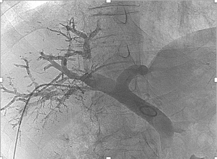 Portografía tras embolización portal realizada en 2014 en la sección de radiología intervencionista del hospital Josep Trueta de Girona.